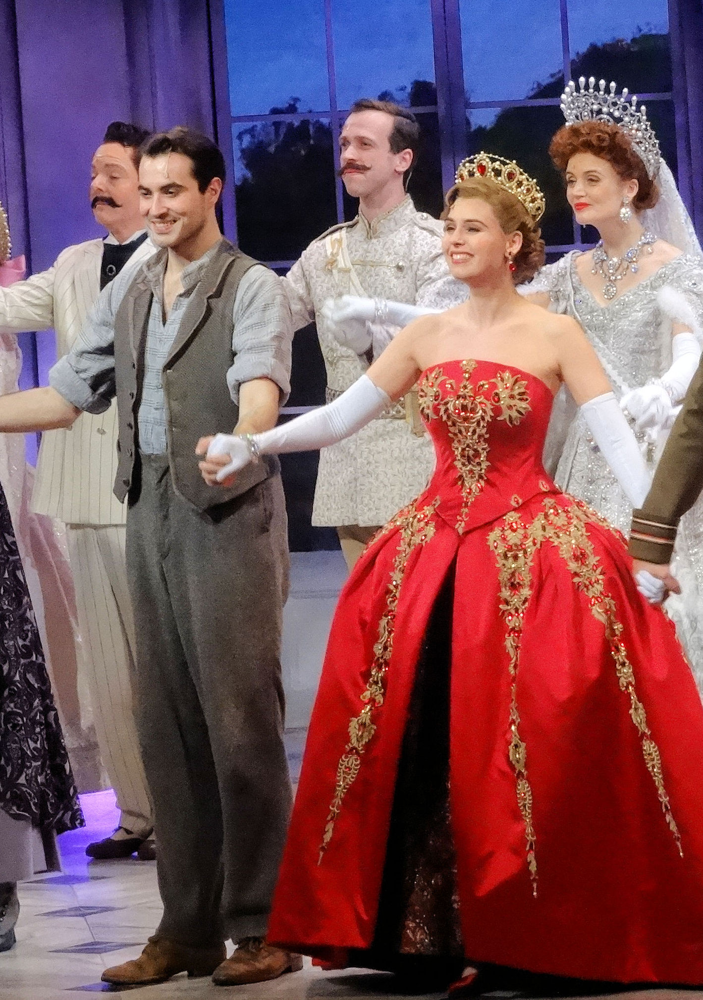 Van Waardenburg en Van Tol in Anastasia (Circustheater, 2020)